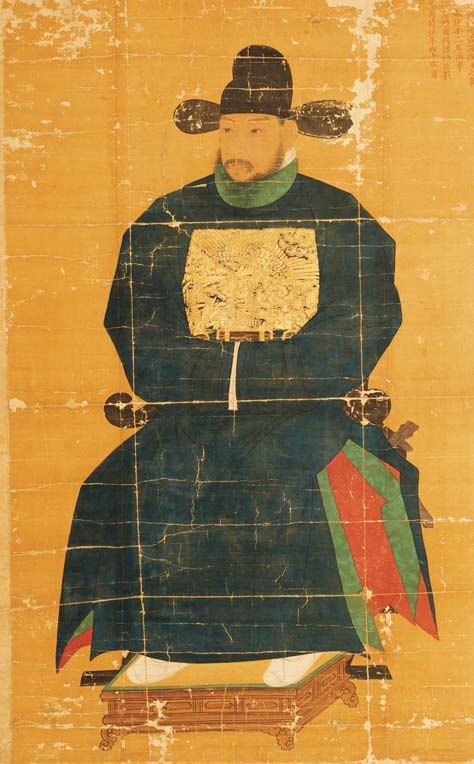 계천군 손소의 공신상 영정, 조선의 유학자 이언적의 외조부, 유학자 손중돈 손숙돈의 아버지